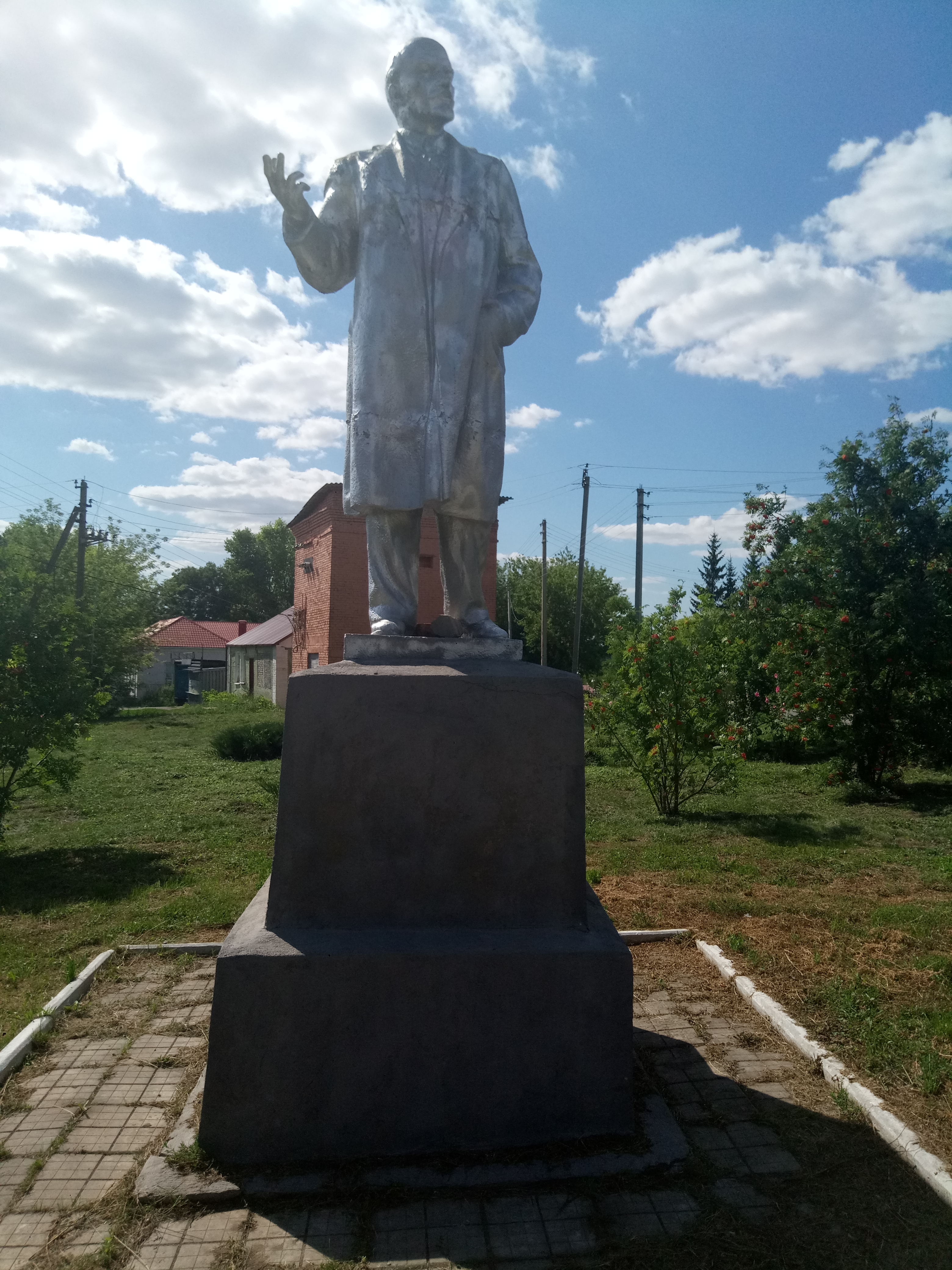 Памятник Ленину в центре села